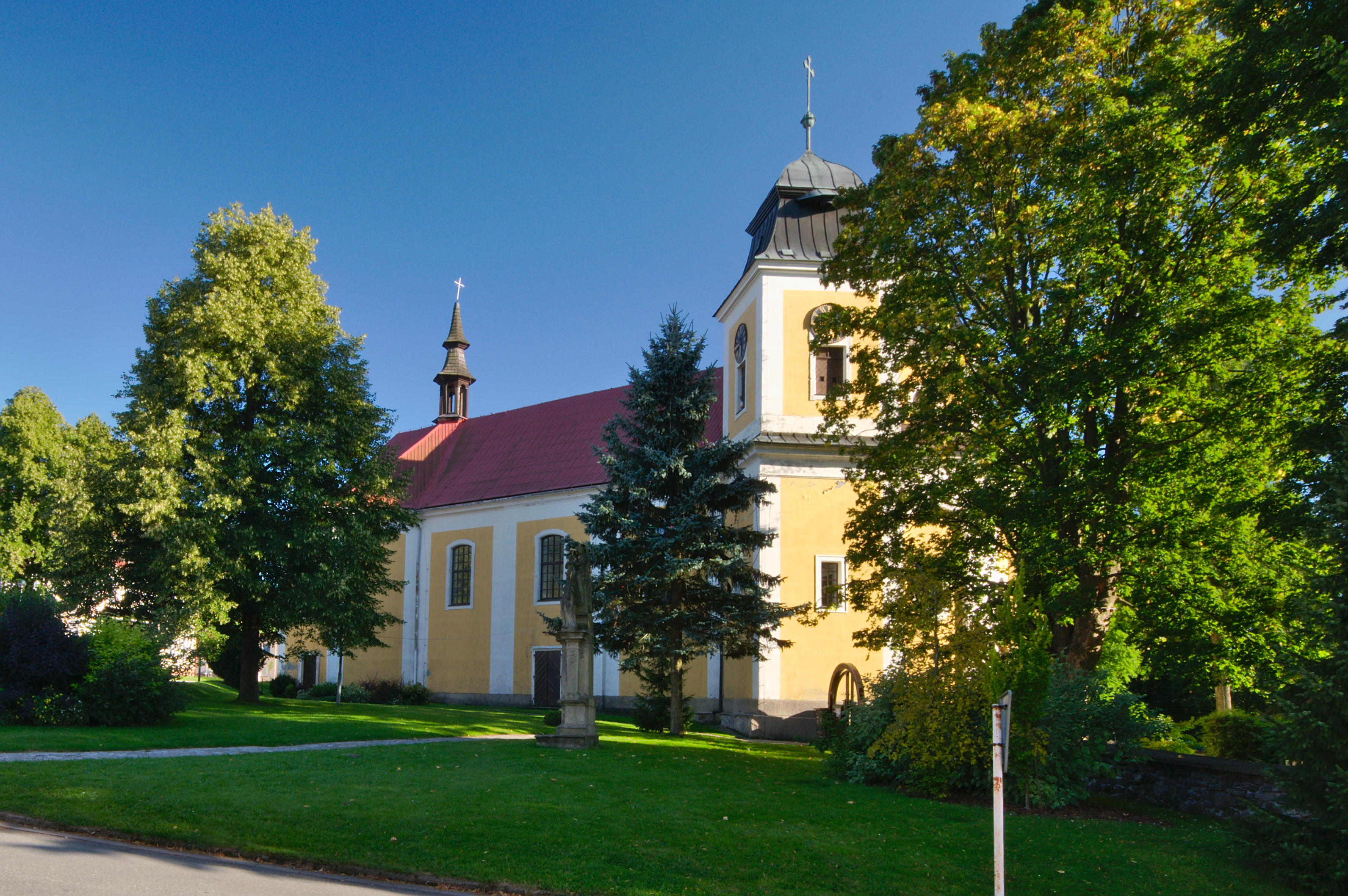 Kostel svaté Máří Magdalény, Deštné v Orlických horách, okres Rychnov nad Kněžnou